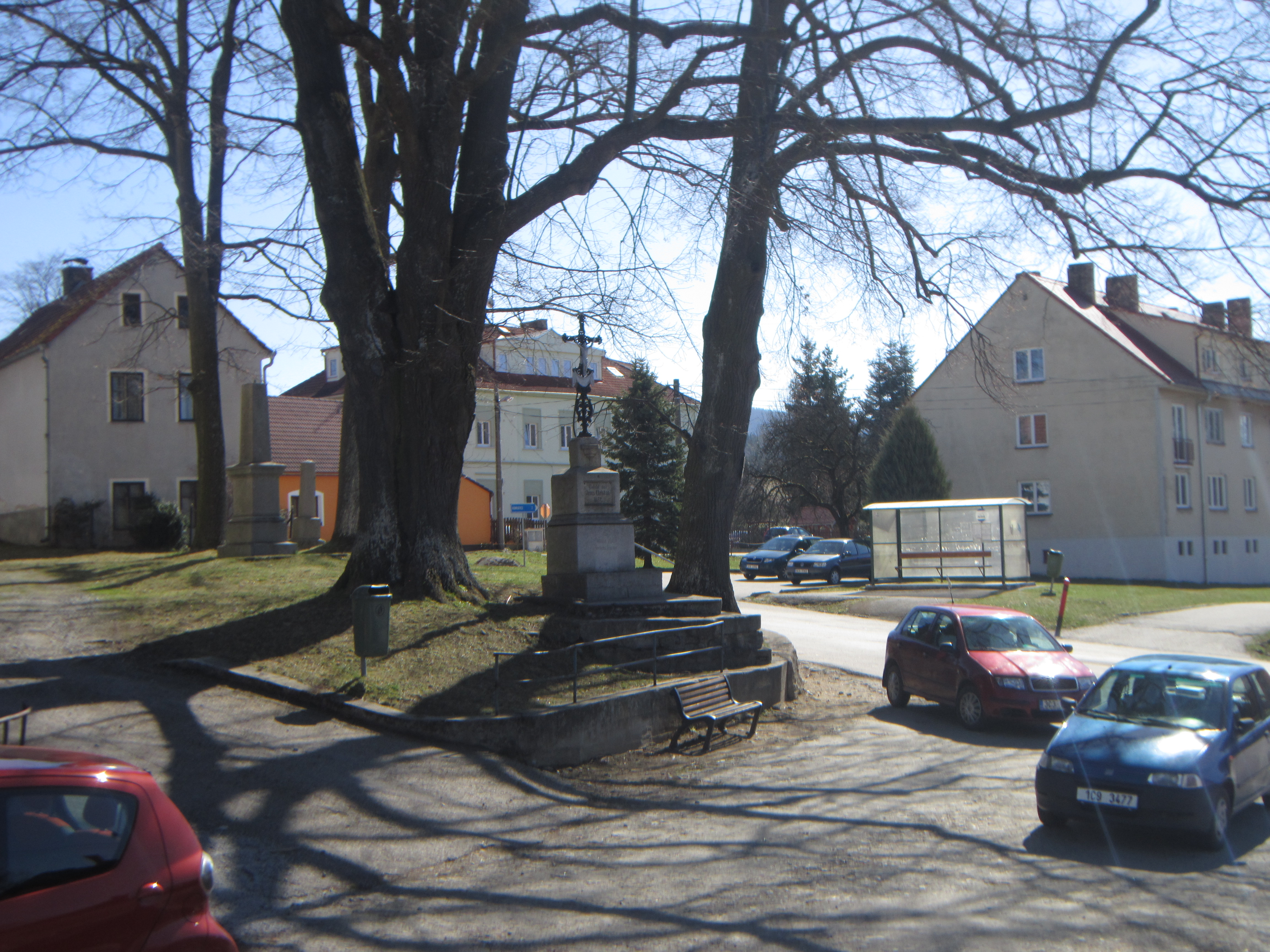 Náves v Rychnově u Nových Hradů.